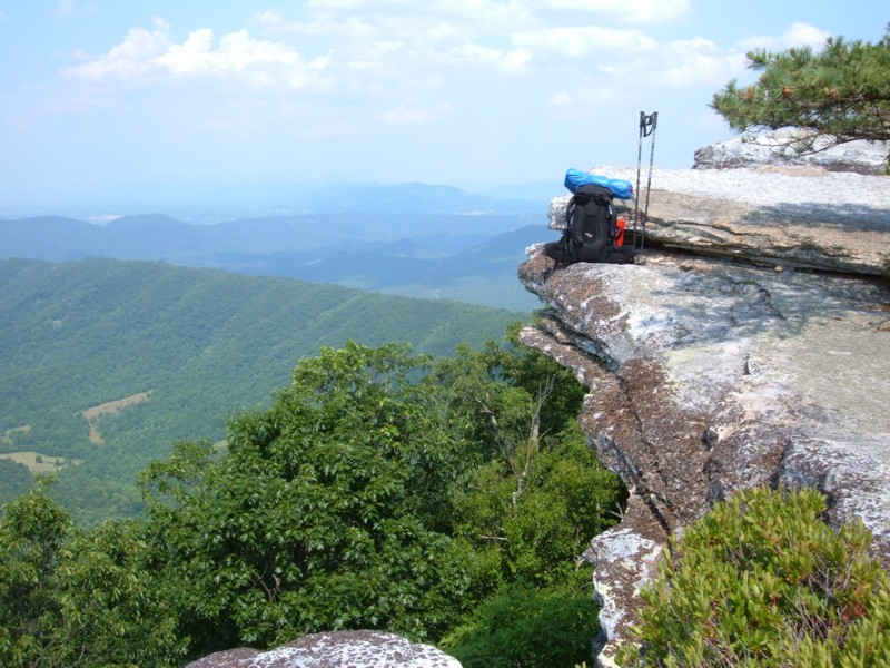 Einer der schönsten und bekanntesten Punkte des Appalachian Trail. Gelegen auf Catawba Mountain, Virginia